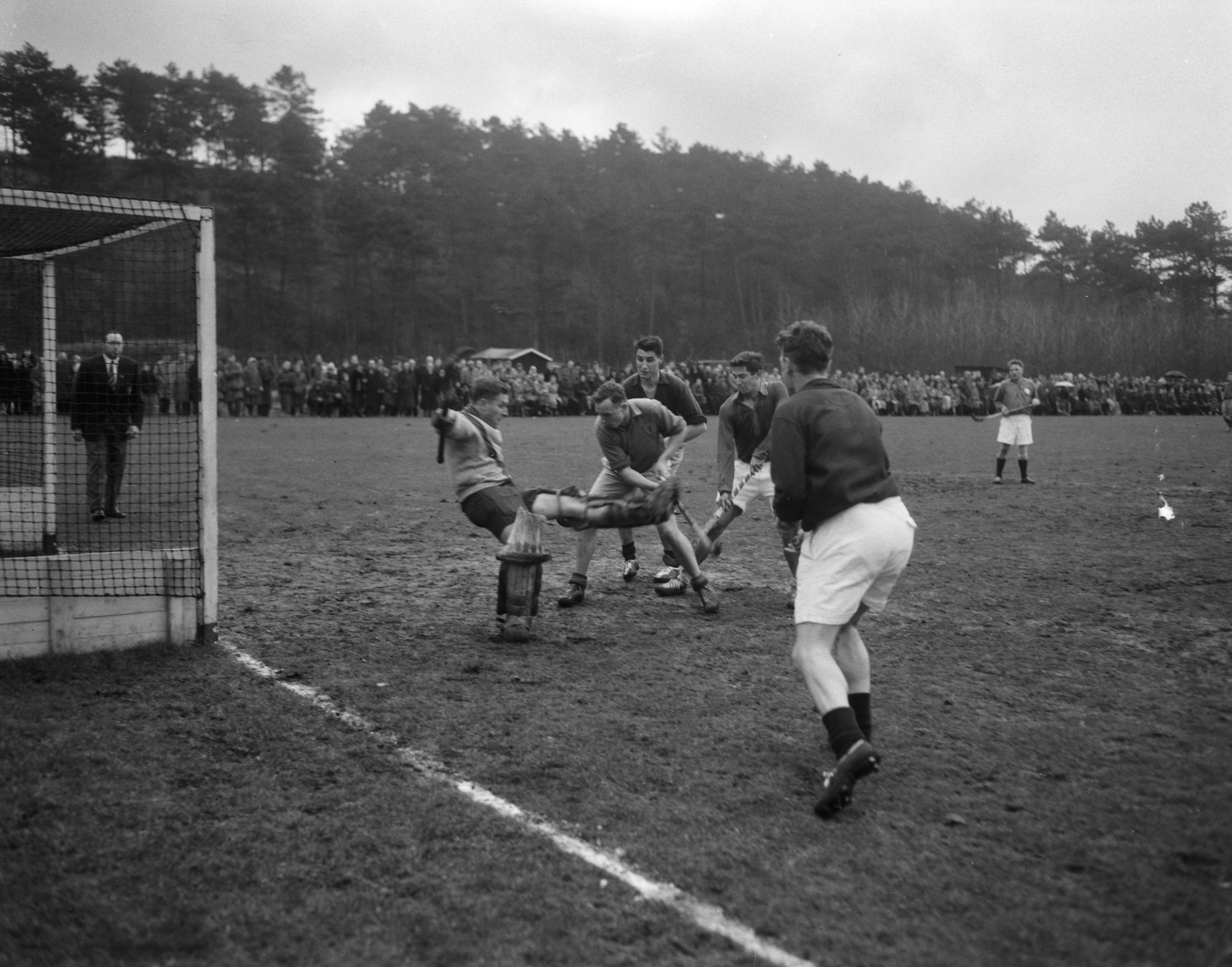 Collectie / Archief : Fotocollectie Anefo Reportage / Serie : [ onbekend ] Beschrijving : Hockey. TOGO kampioen 1e klasse West na overwinning op HHYC op Klein-Zwitserland (1-0) Annotatie : Het moment waarop het doelpunt ontstond. Een voor het doel geplaatste bal had een schermutseling tot gevolg, waaruit Dudok van Heel de bal in de kooi prikte. De poging van doelman Tesco om trappende nog redding te brengen mislukte. Datum : 17 februari 1957 Locatie : Den Haag Trefwoorden : hockey, sport Fotograaf : Fotograaf Onbekend / Anefo Auteursrechthebbende : Nationaal Archief Materiaalsoort : Negatief (zwart/wit) Nummer archiefinventaris : bekijk toegang 2.24.01.04 Bestanddeelnummer : 934-6121